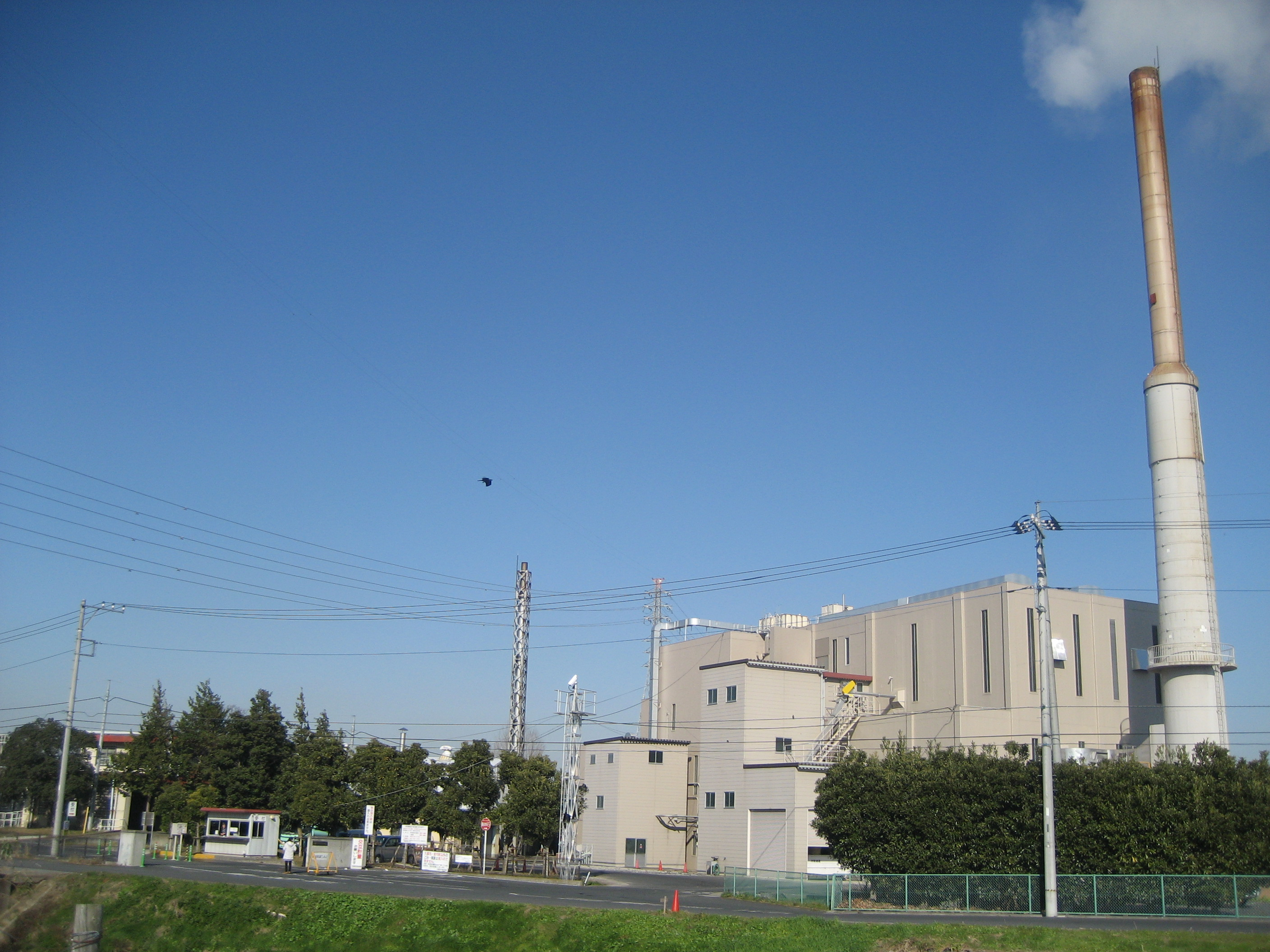 久喜宮代衛生組合久喜宮代清掃センター